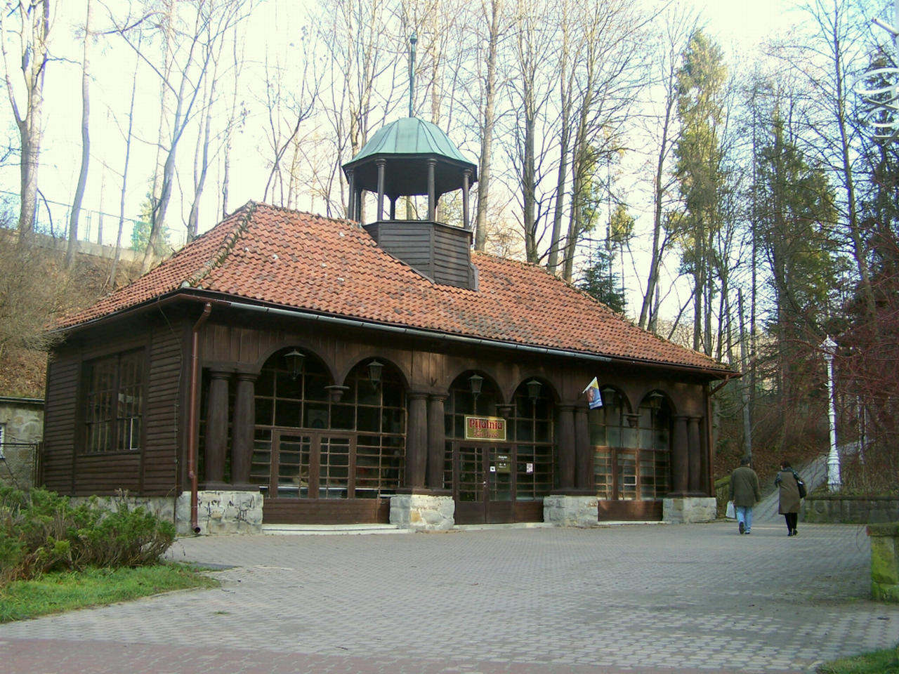 Krynica-Zdrój - pijalnia "Jan Józef".